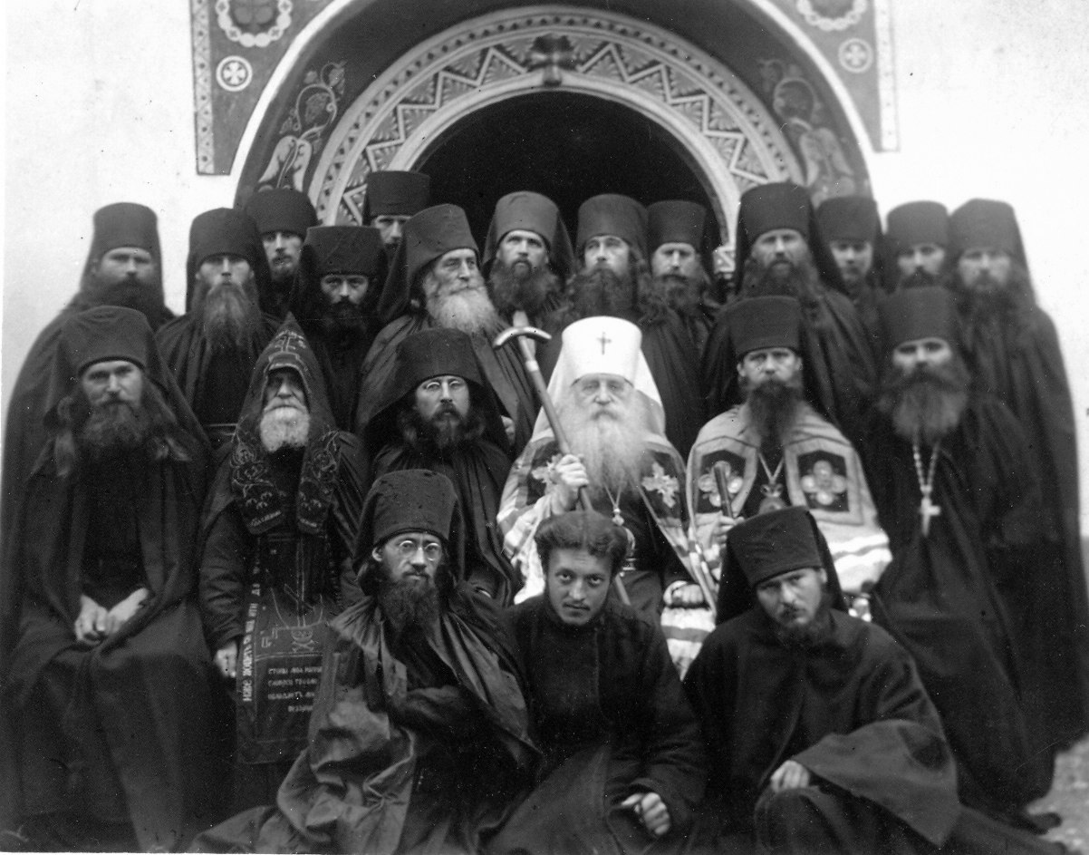 Митрополит Антоний (Храповицкий) с братией Свято-Введенского Мильковского монастыря в Сербии. По правую руку митрополита: схиархимандрит Амвросий (Курганов), иеросхимонах Марк, иеромонах Каллист. По левую руку: епископ Тихон (Троицкий, споследствии архиеп. Сан-Францисский и Западно-Американский) и архимандрит Феодосий (Мельник), за ним крайний слева стоит иеромонах Иоанн (Максимович, впоследсвии архиеп. Сан-Францисский), а рядом с ним иером. Антоний (Синкевич, впоследствии архиеп. Лос-Анжелосский). В нижнем левом ряду в центре сидит послушник Артемий (впоследствии архиеп. Антоний Сан-Францисский).